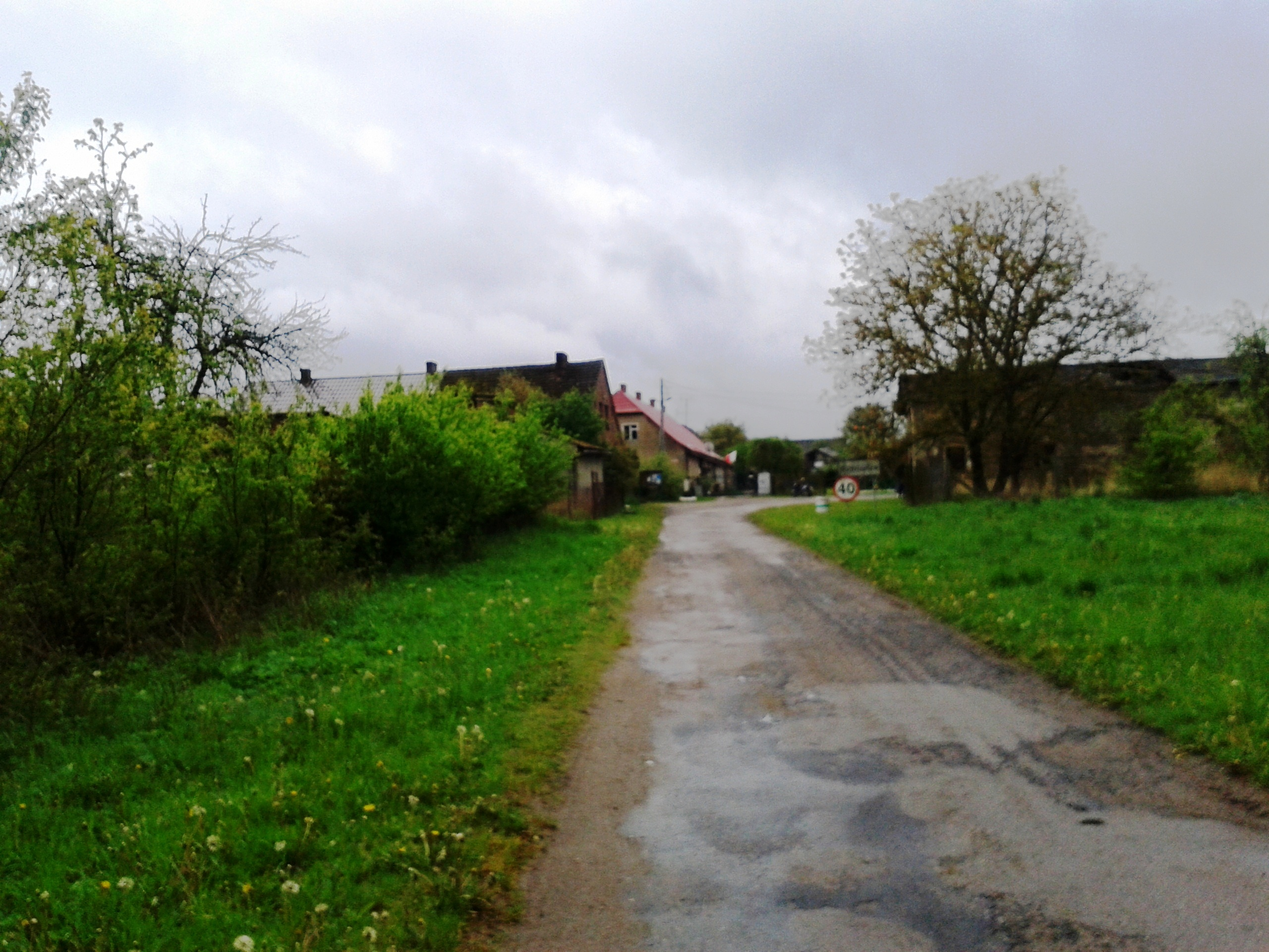 Zagórki - gmina Drawsko Pomorske